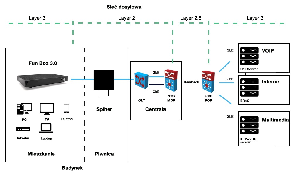 Grafika przedstawia przedstawia architekturę FTTH z wyszczególnieniem sieci dostępowej i dystrybucyjnej.